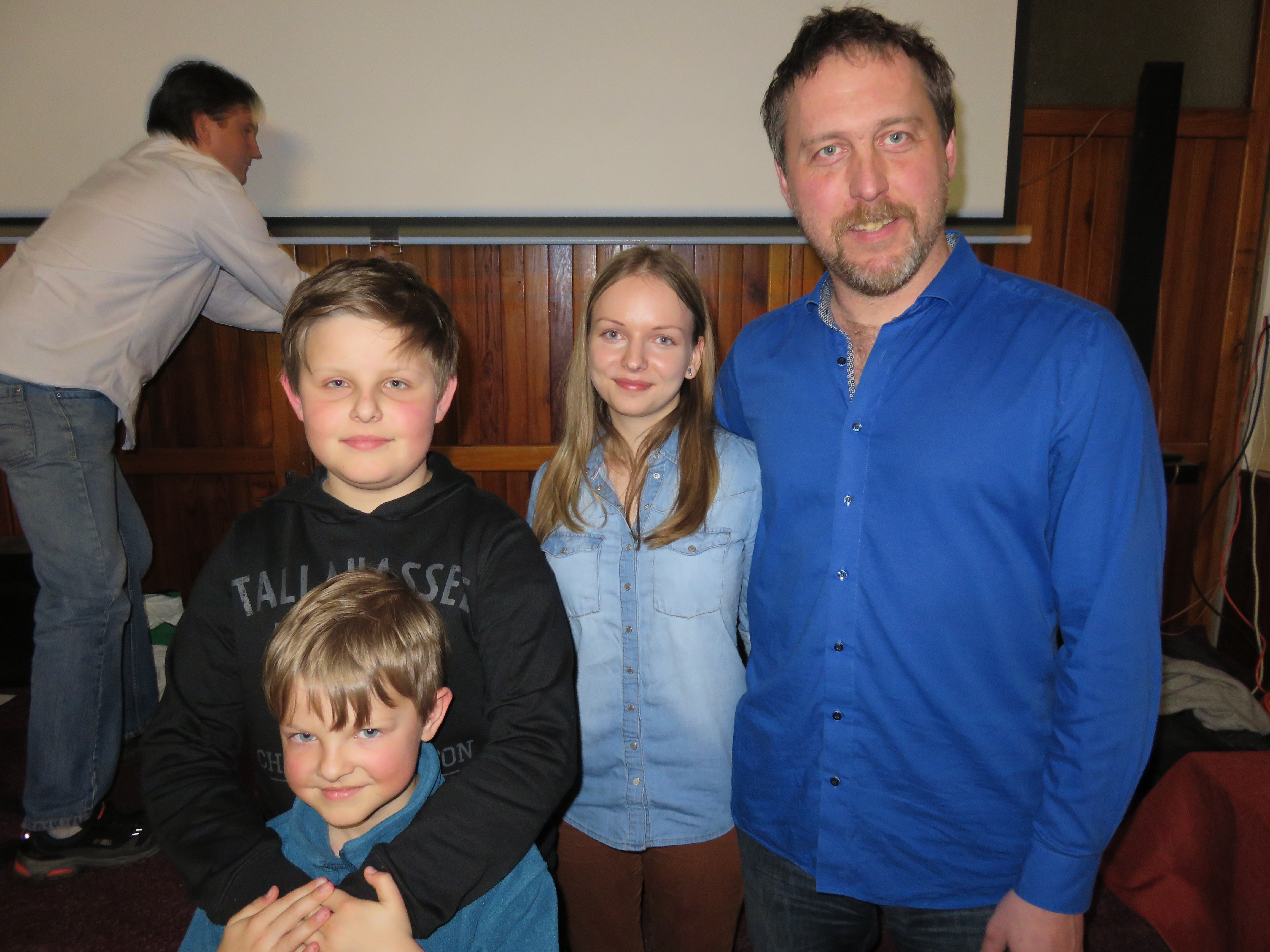 Dan Přibáň, Dominika Gawliczková a mladí fanoušci Alex a Max po přednášce o cestě Trabantem po Africe v Netunicích.